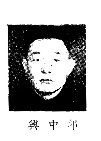 中文（中国大陆）: 制憲國民大會代表